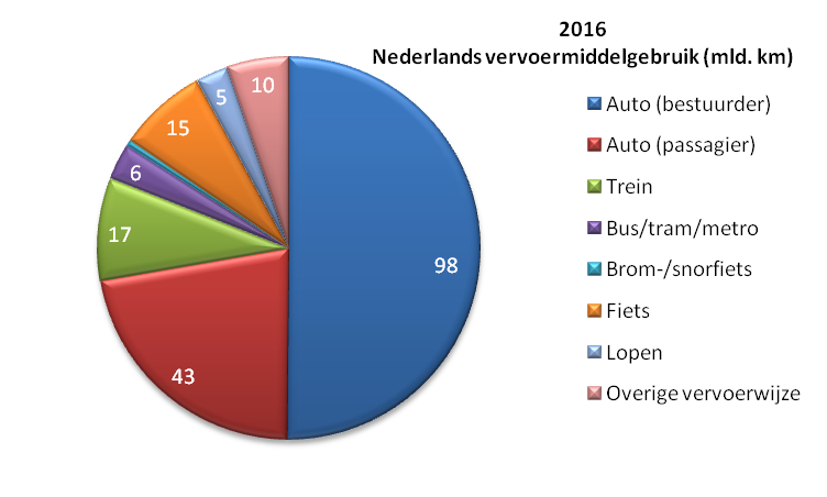 Vervoermiddelgebruik in Nederland (2016)